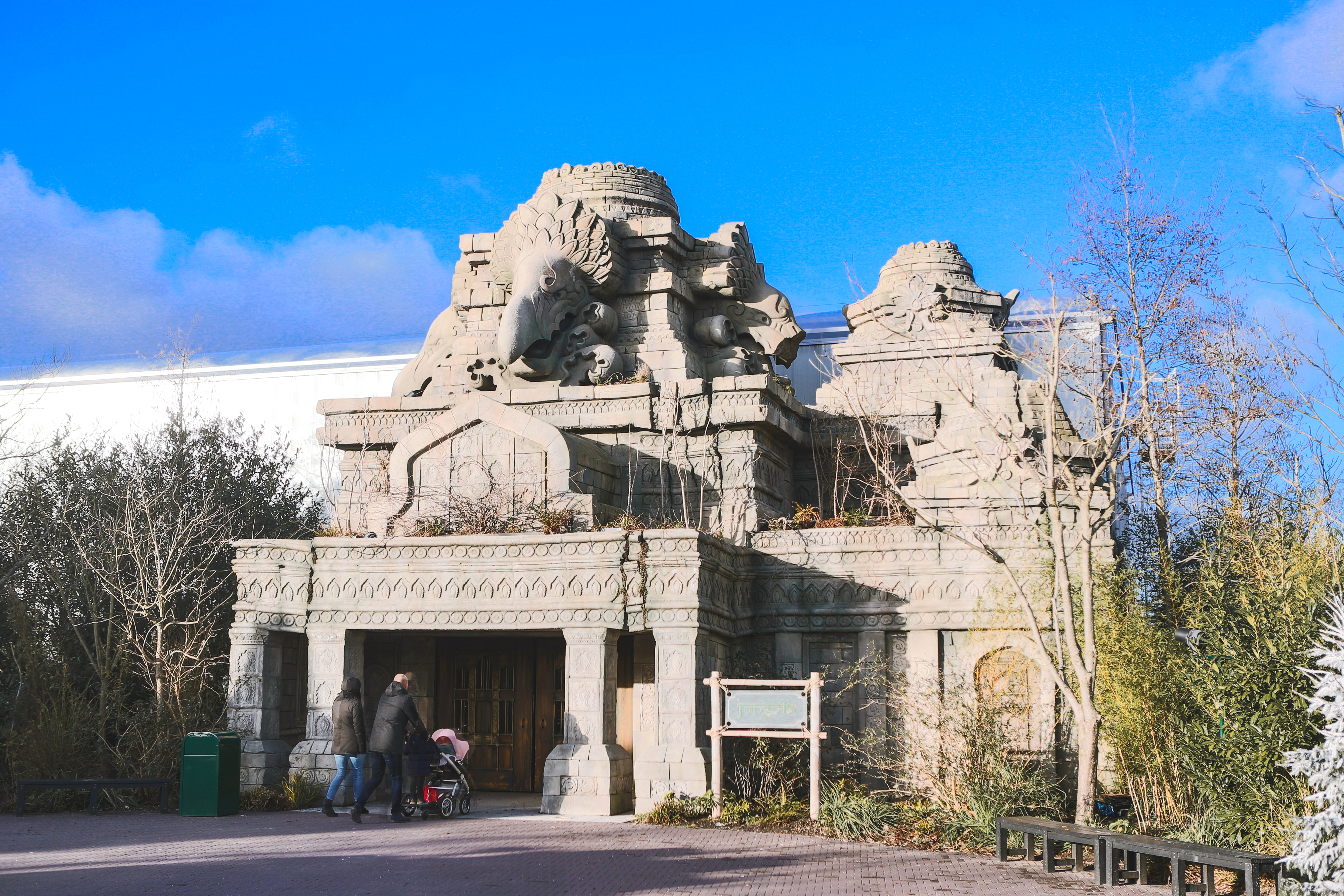 Wildlands Adventure Zoo in Emmen (2019)